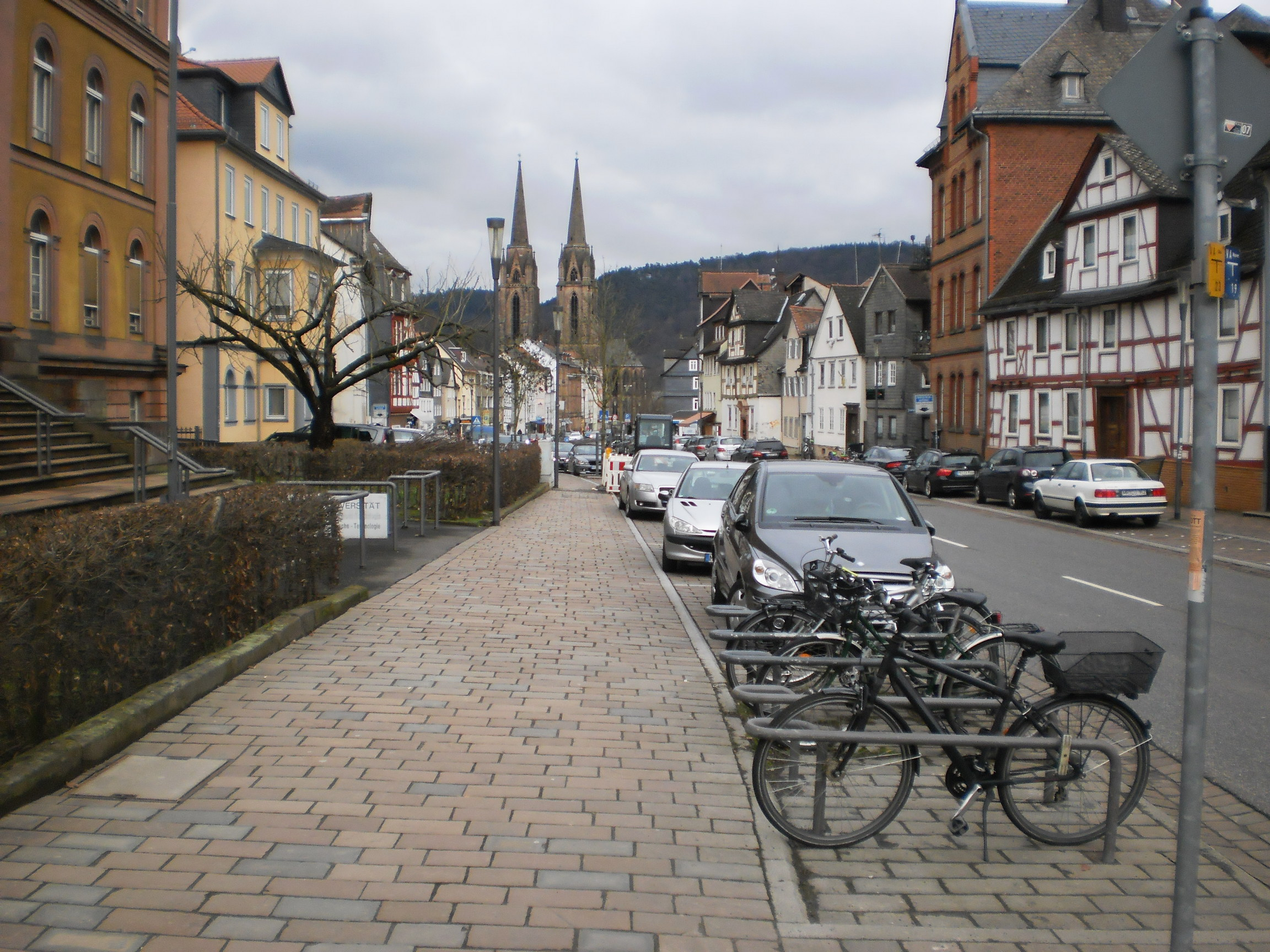 Fahrradabstellanlage (← WP-Artikel) - (Rhein-Ruhr-Bügel) in der Strasse Ketzerbach Marburg vor dem Institut für Pharmazeutische Technologie der Philipps-Universität: Die Bügel wurden neben dem breiten Bürgersteig montiert, der stadteinwärts in Richtung Elisabethkirche (E-Kirche) ein bedeutsamer Weg für blinde oder sehbehinderte Personen ist. Gesehen von der Einmündung der Wilhelm Roser-Strasse, durch die man etwas aufwärts von der Ketzerbach zur Schule der Blindenstudienanstalt und auch weiter hoch ins Stadtviertel Grassenberg und zur heute bewaldeten Augustenruhe gelangt. Unterhalb des Hügels ist allerdings ein wenig bekannter Panoramaweg ("Am Weinberg") oberhalb der Ketzerbach.